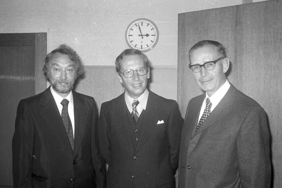 V.l.n.r.: (neuer) OPD-Präsident Werner Spanehl, Bundespostminister Kurt Gscheidle, (scheidender) OPD-Präsident Fritz Helbing.